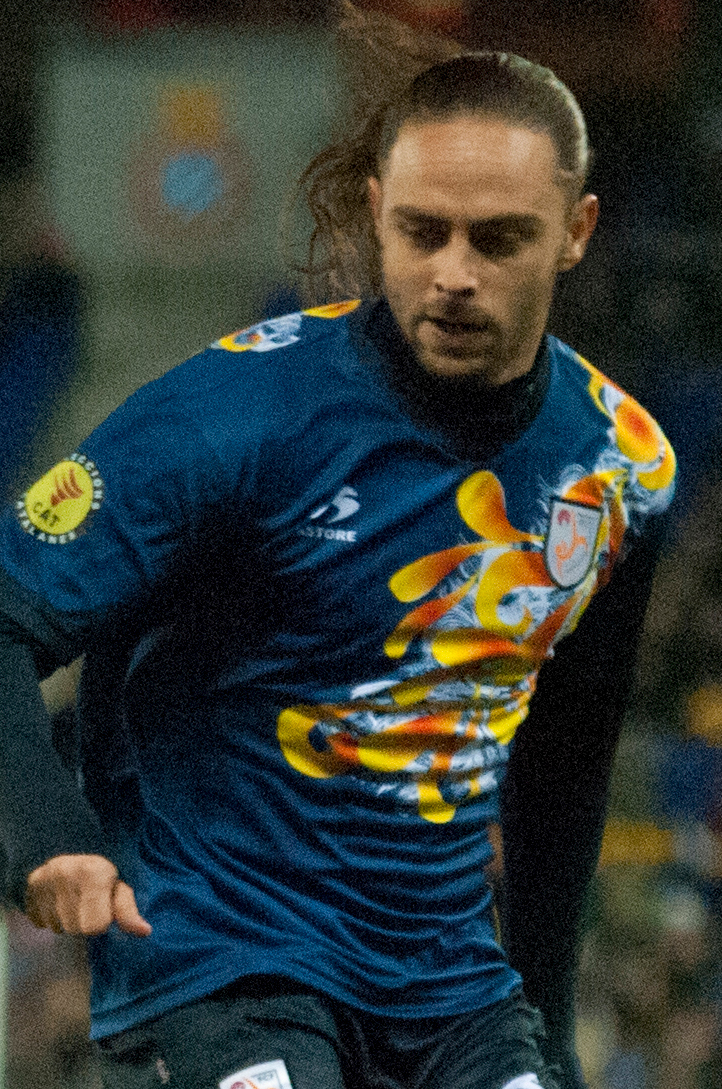 Sergio Garcia, en un partit de la selecció.